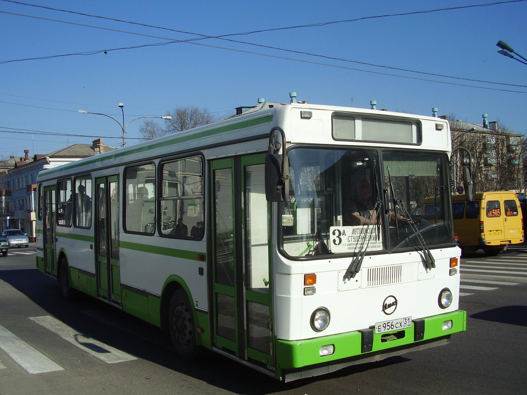 Городской автобус ЛиАЗ-5256_в_Старом Осколе